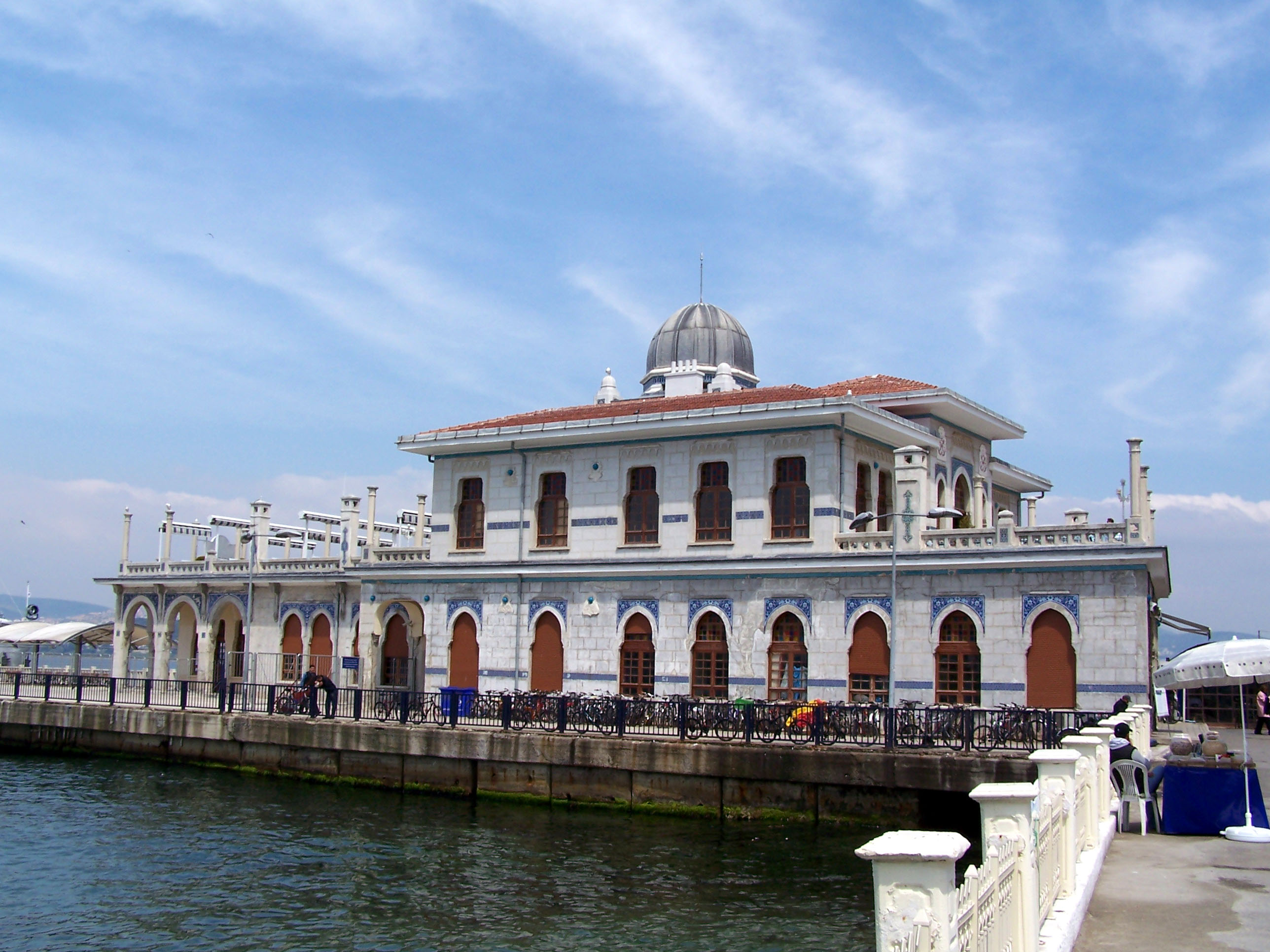 Ferry port in Büyükada, Turkey